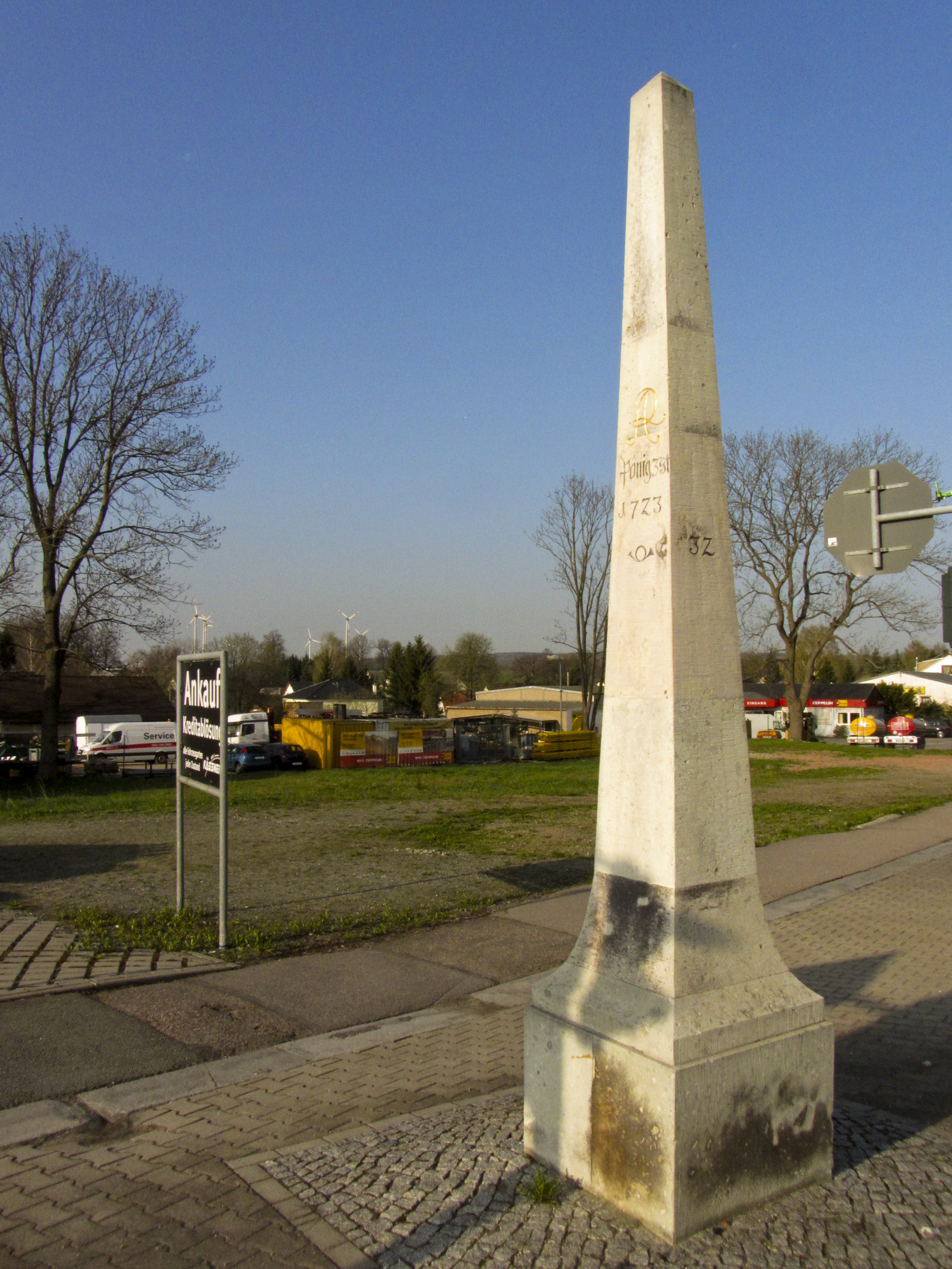 Kursächsische Postmeilensäule Ganzmeilensäule in Röhrsdorf bei Chemnitz